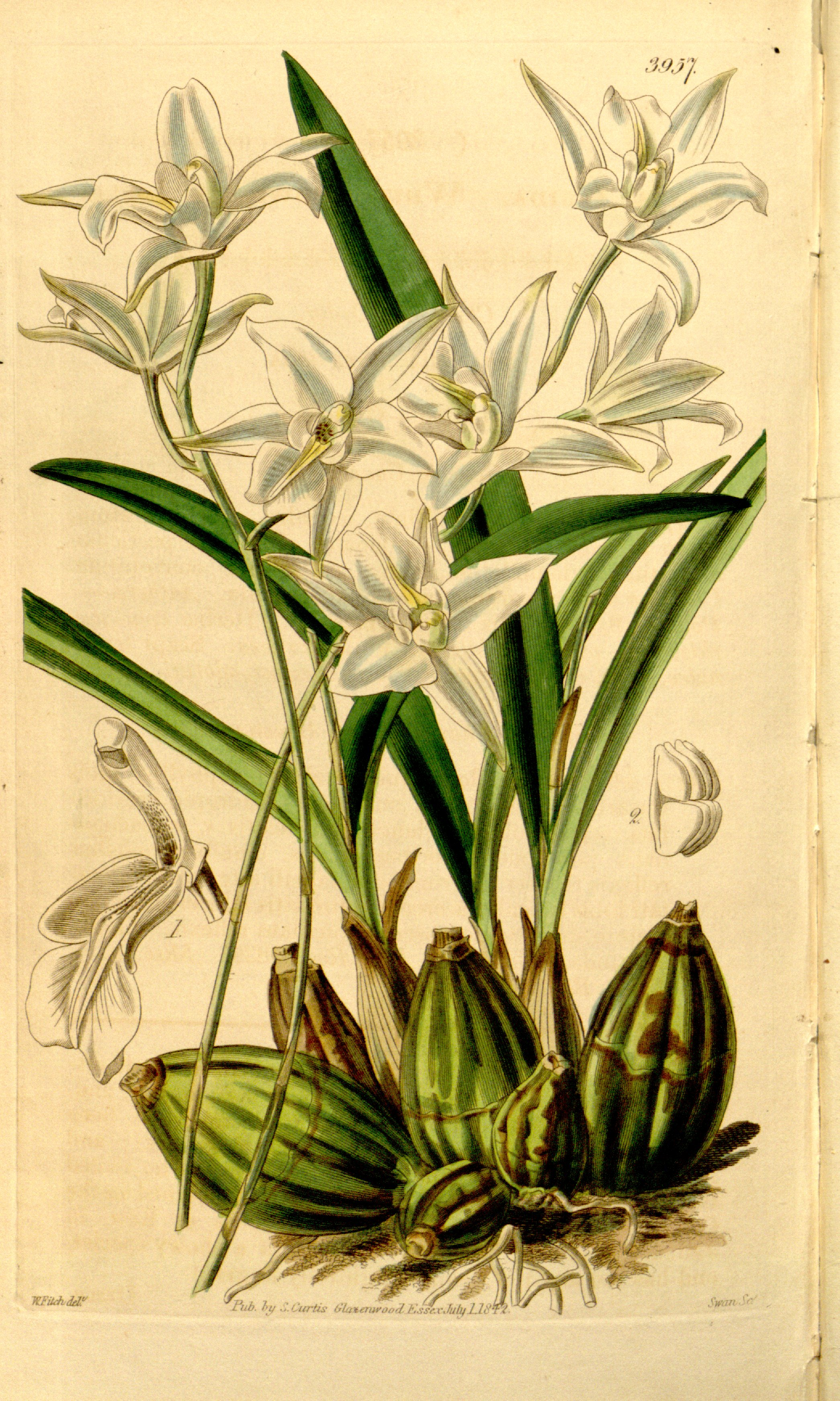 Illustration of Laelia albida